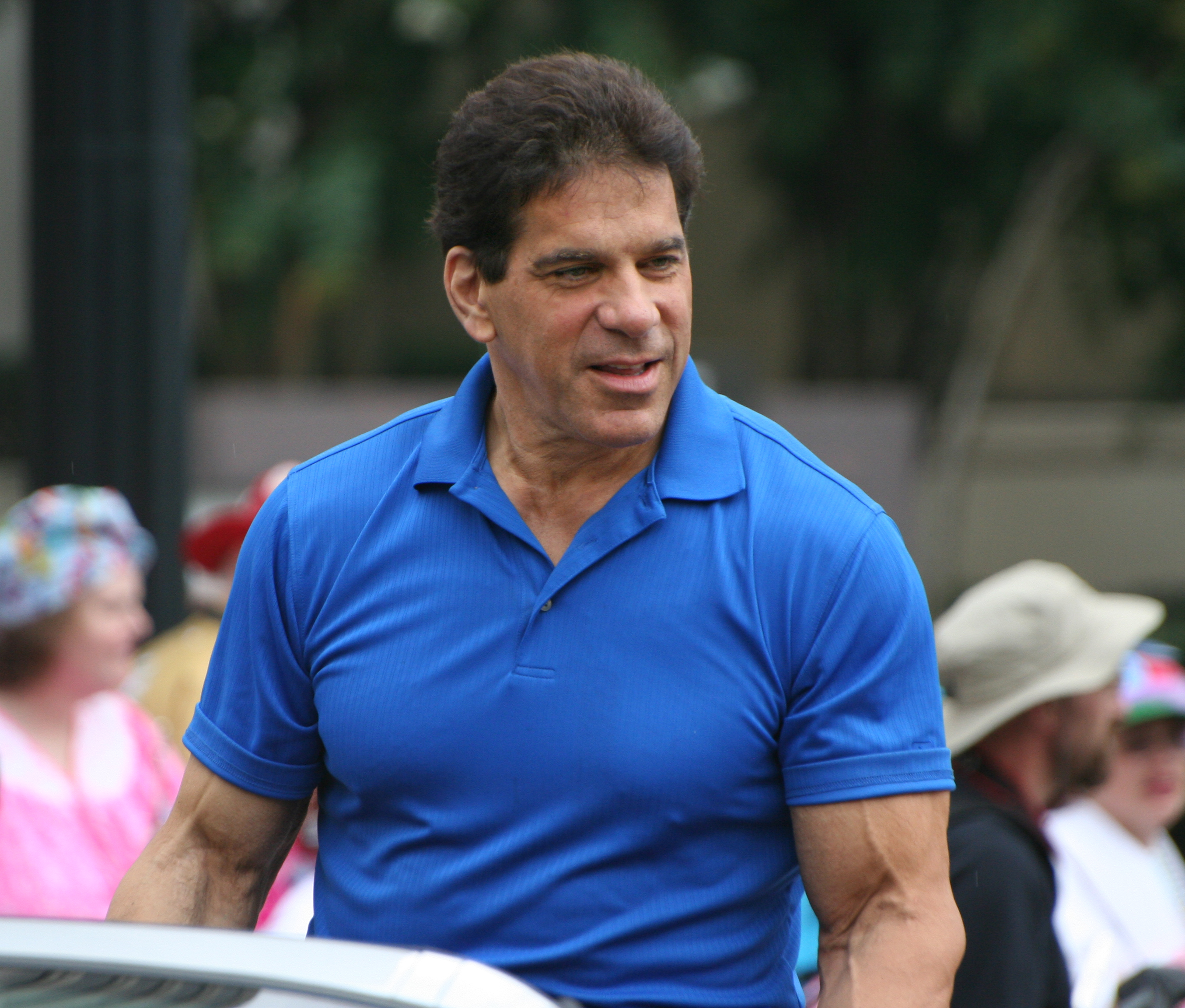 Lou Ferrigno at 2009 Dragon Con Parade.